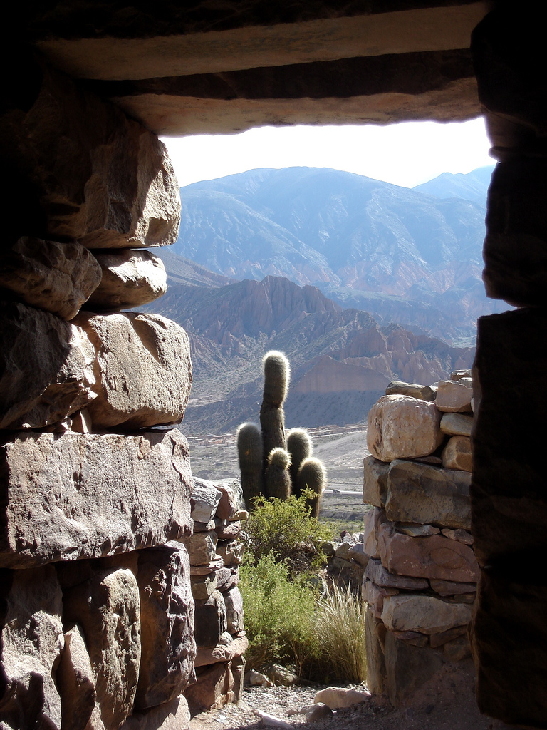 Pucará de Tilcara. Jujuy. Argentina. Quebrada de HumahuacaTilcara - Pukará IV